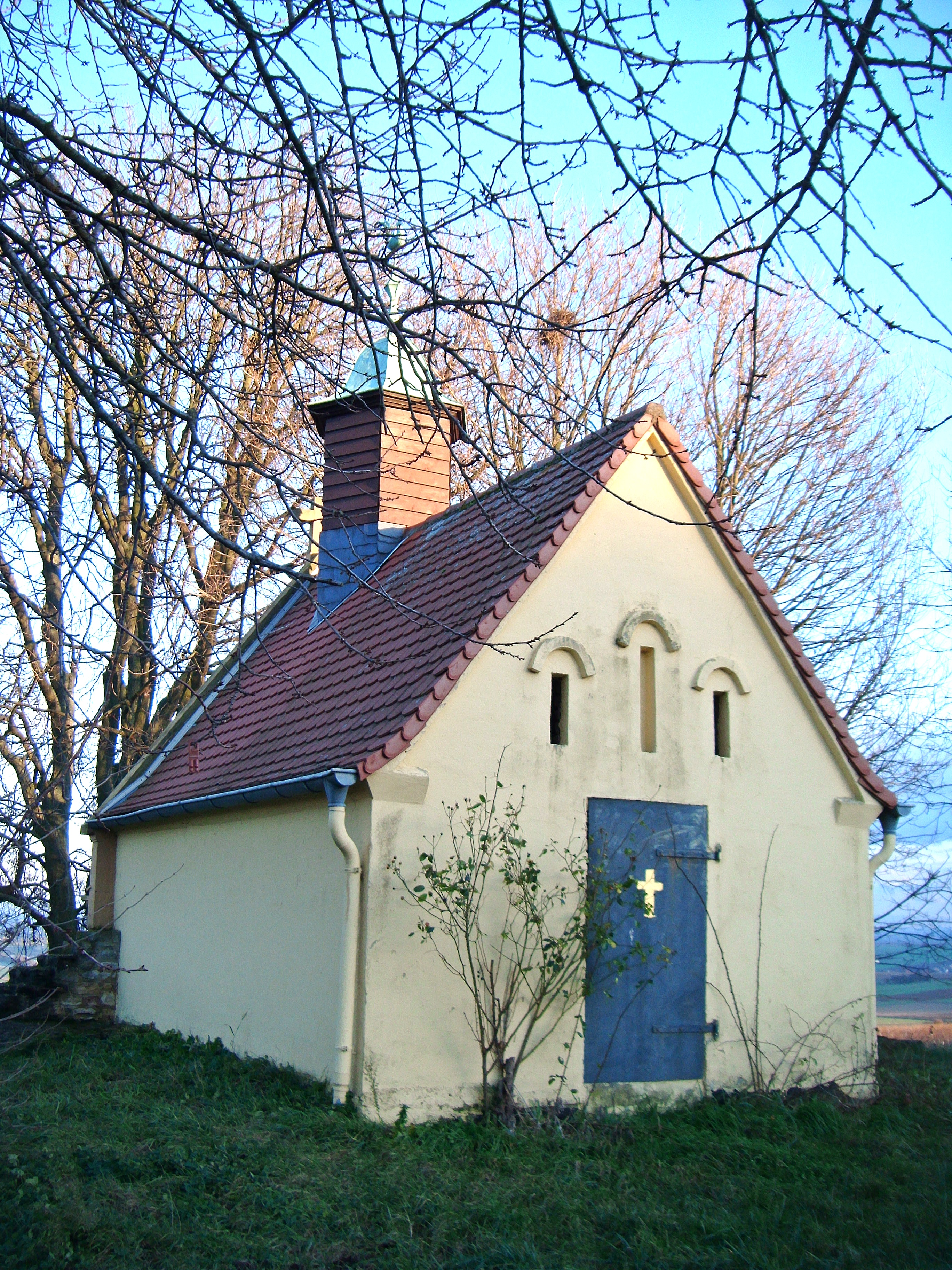 Bockenheim an der Weinstraße, Heiligenkirche (St. Peter), Scheinaufbau mit Dachreiter (Sakristei)